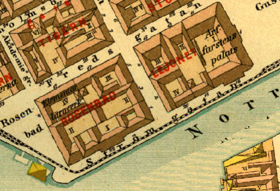 Kvarteret Rosenbad på 1885 års stadskarta